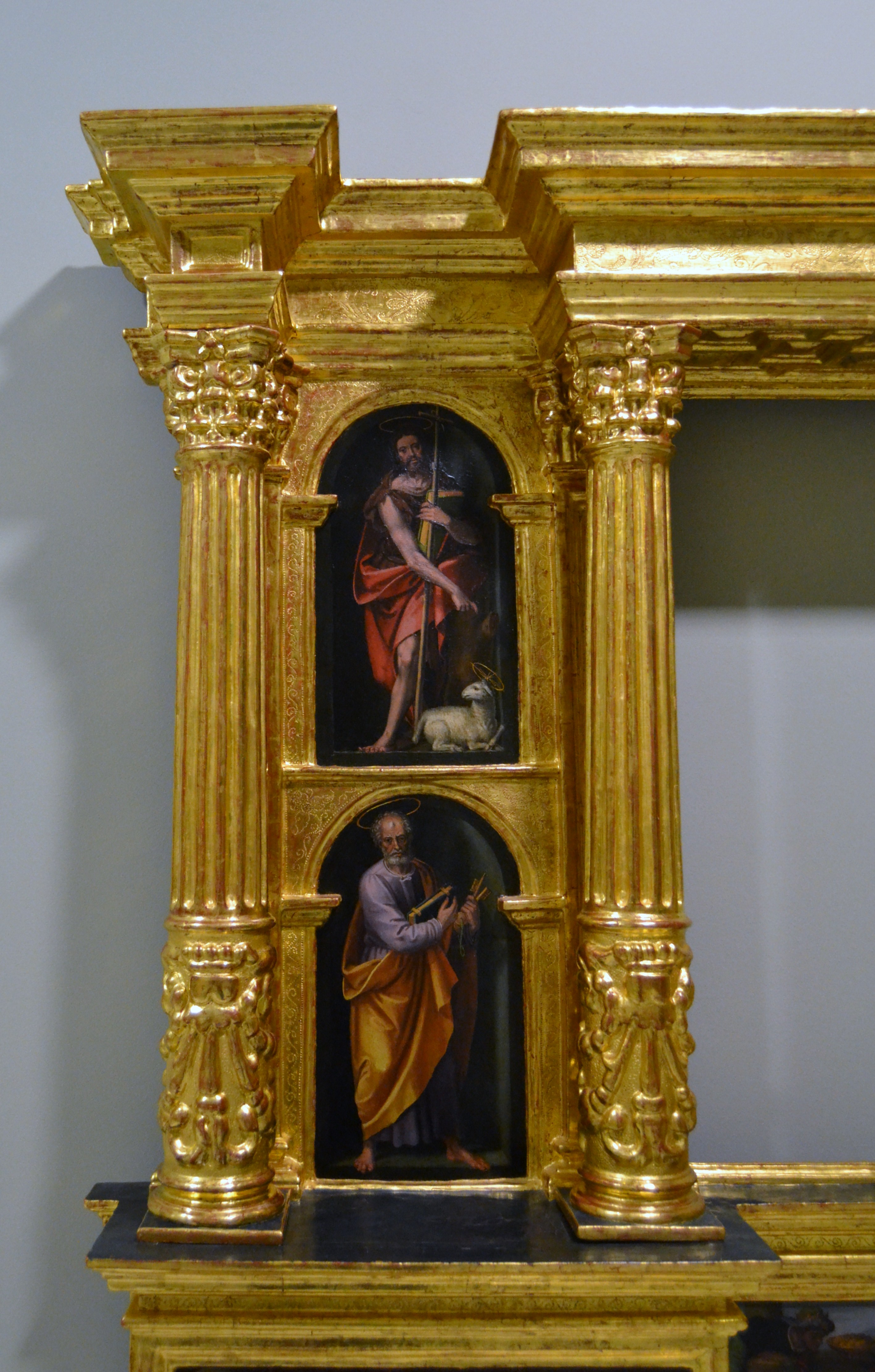 Fragmento de un retablo.